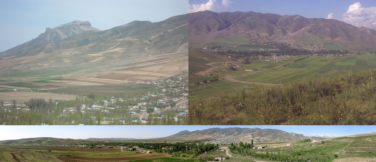 شهرکی شورآباد مرکز ناحیه شورآباد. Тоҷикӣ: Шаҳраки шӯрообод макази Ноҳияи шӯрообод.